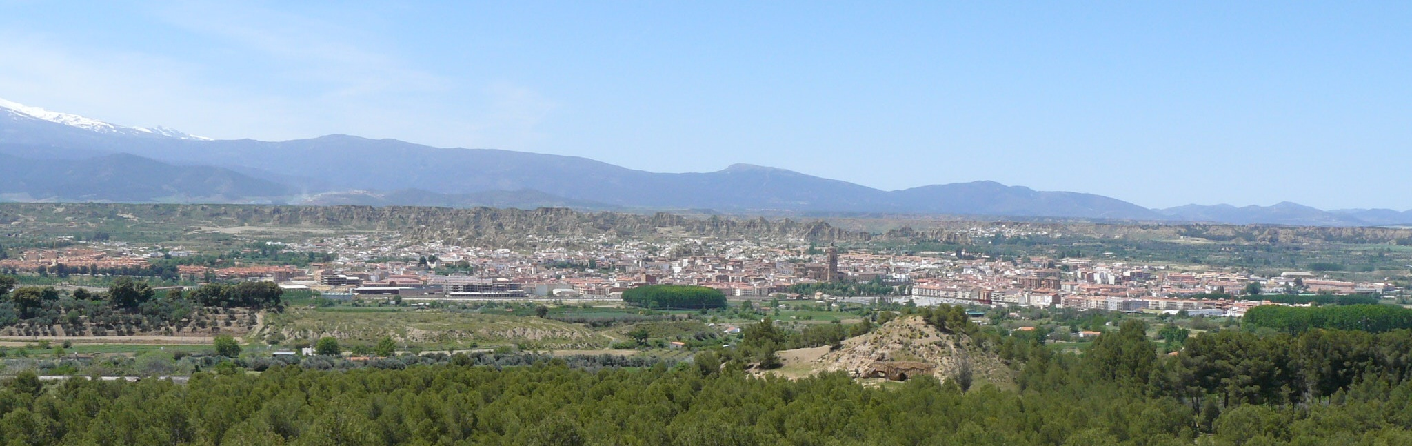 Panorámica de Guadix. Al fondo, Sierra Nevada.